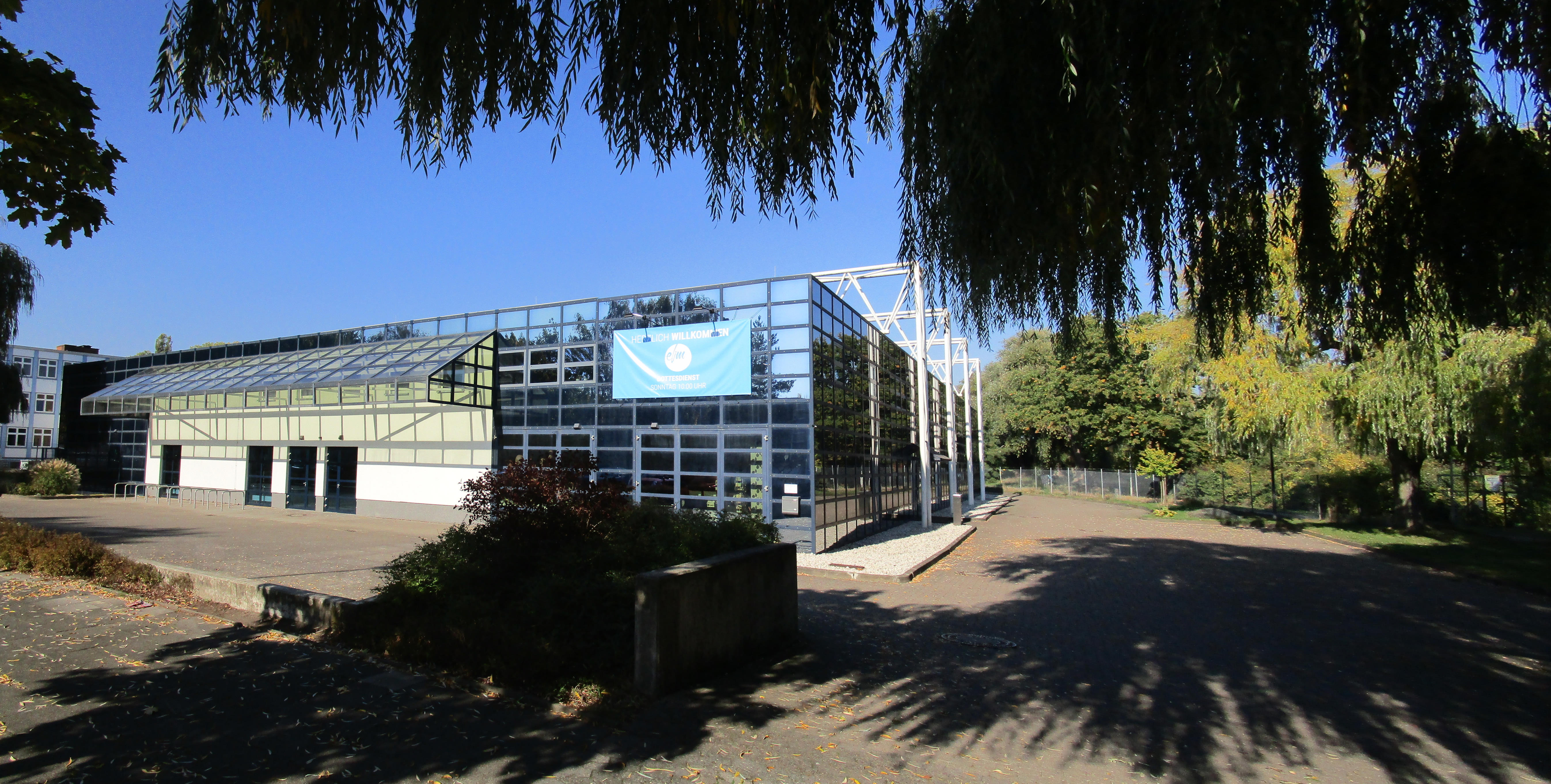 Die Elim-Christengemeinde in Hannover nutzt im Stadtteil List ein architektonisch interessantes Gebäude, das am Rand eines Gewerbegebietes und eines Grünzuges liegt.